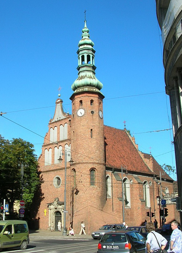 Kościół p.w. Wniebowzięcia Najświętszej Marii Panny w Bydgoszczy - dawny kościół Klarysek (1582/1615 r.)